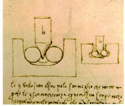 Schéma d'une crapaudine dessiné par Léonard de Vinci (Codex Madrid I, f101v).